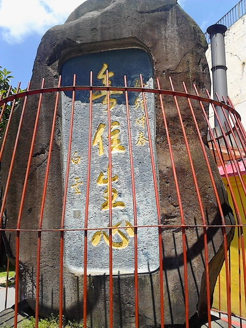 zh-TW